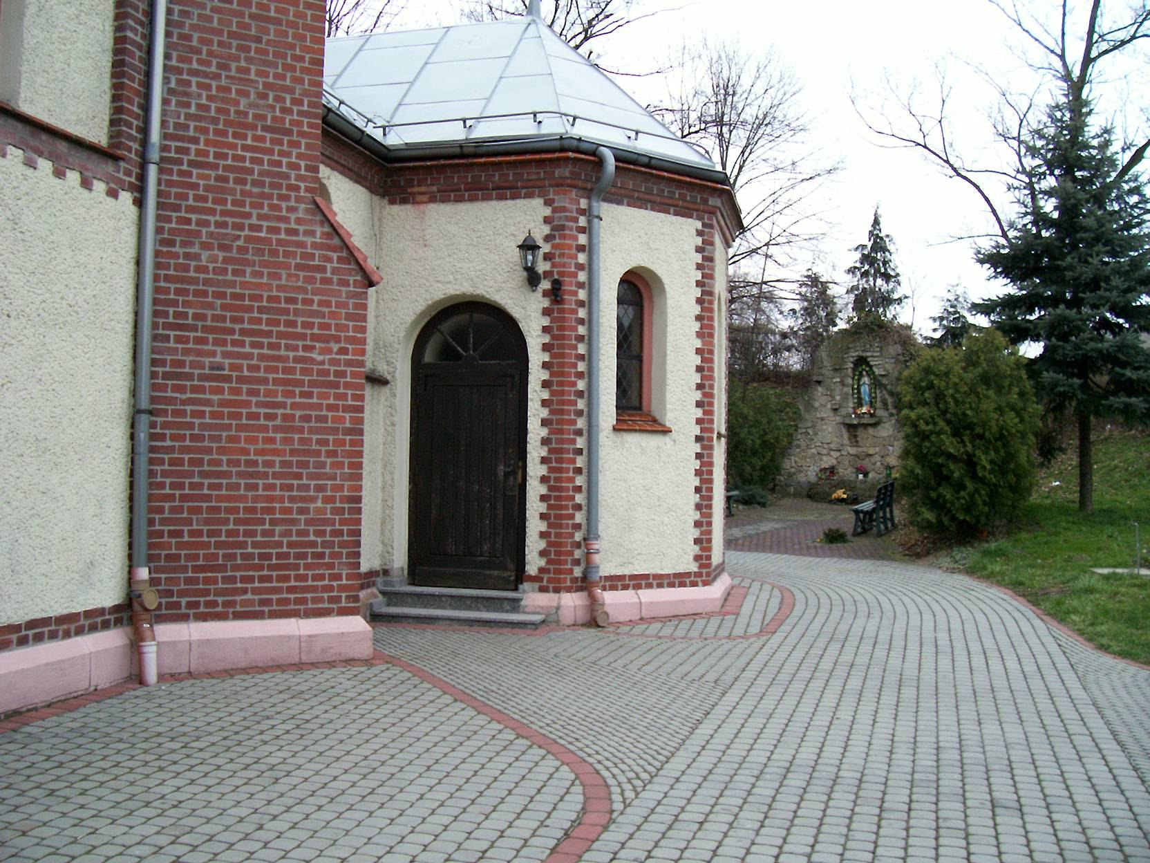 Kościół pw. Najświętszej Marii Panny w Krowiarkach: zakrystia